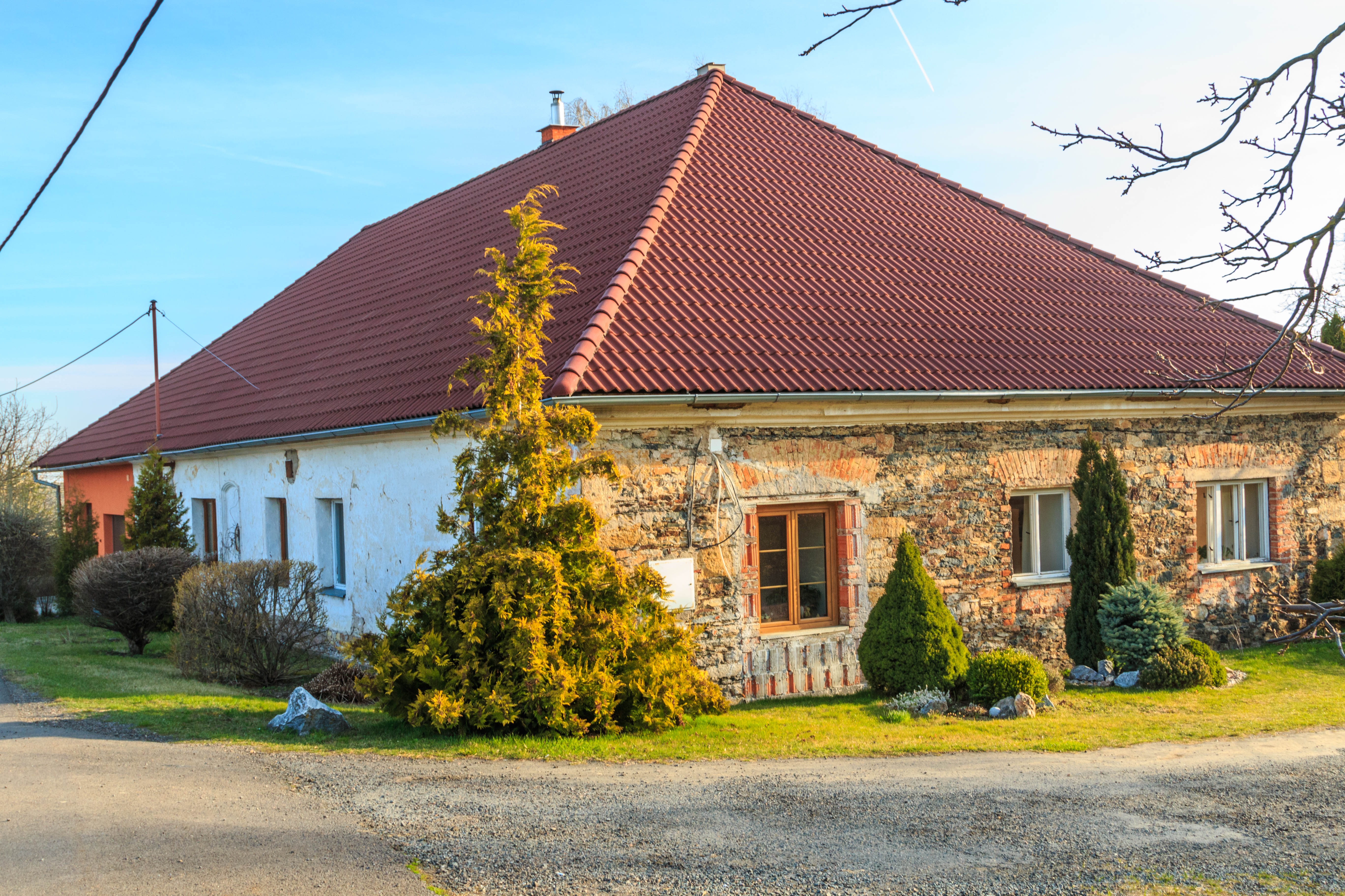 Nerozhovice u Vápenného podola - dům čp. 18